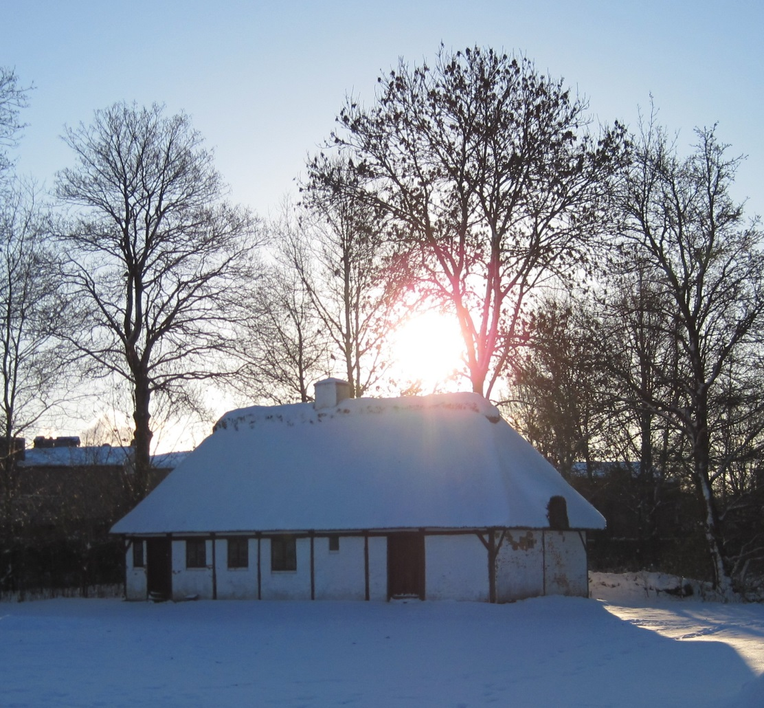 Ane Marie Laursen (1890-1969) var eneboer, hun var født og opvokset i huset på Barslund Hede ved Grove. Da forældrene døde, blev hun boende og drev selv det lille hedelandbrug videre. Ane Marie blev kendt som hedens sidste eneboer. Huset er efter hendes død blevet flyttet til Frilandsmuseet, Herning.